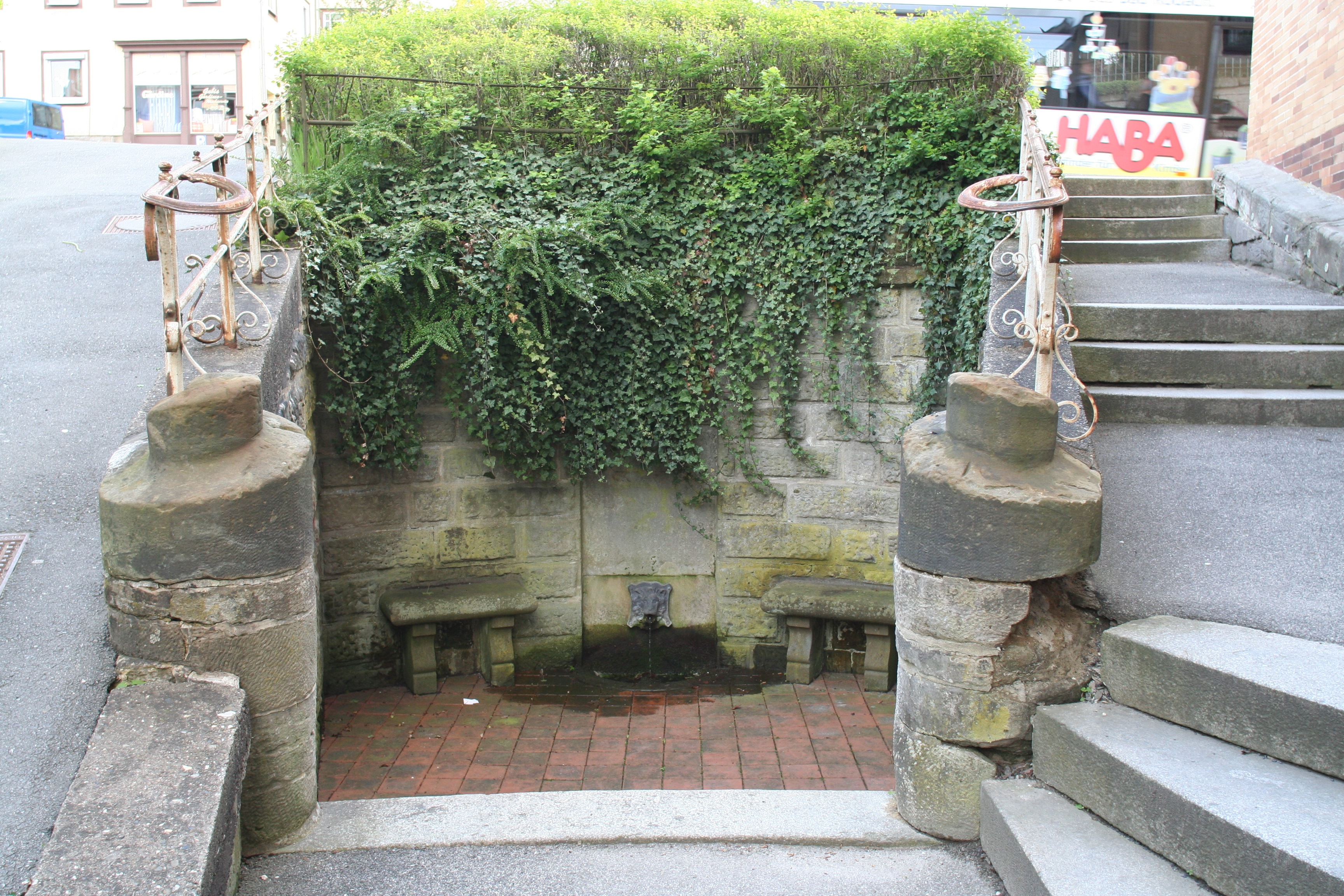 Queckbrunnen bei Steintor 17 in Coburg